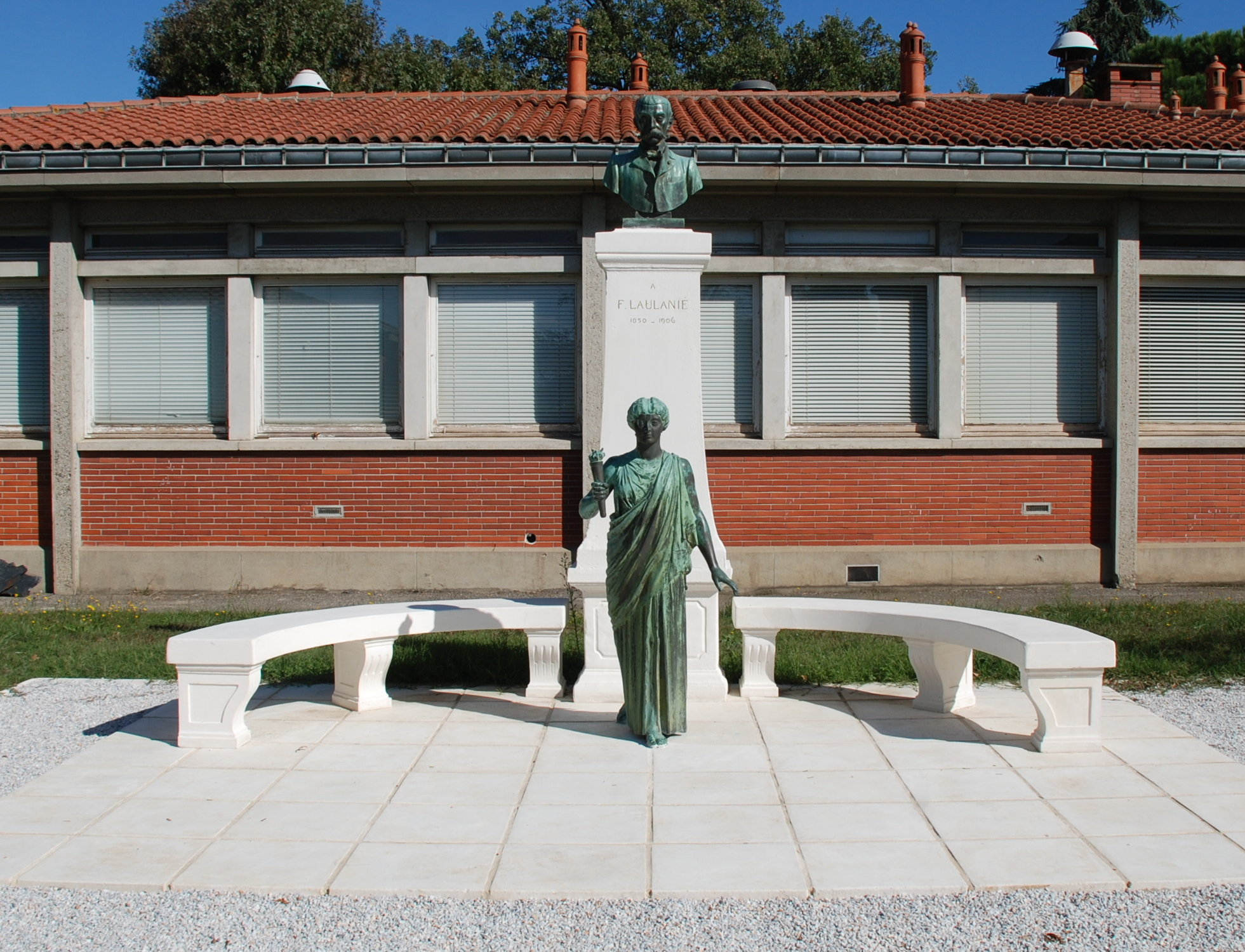 Monument Laulanié inauguré en 1911 dans l'Ancienne école nationale vétérinaire de Toulouse et reconstruit en 2009 dans l'Ecole vétérinaire actuelle.